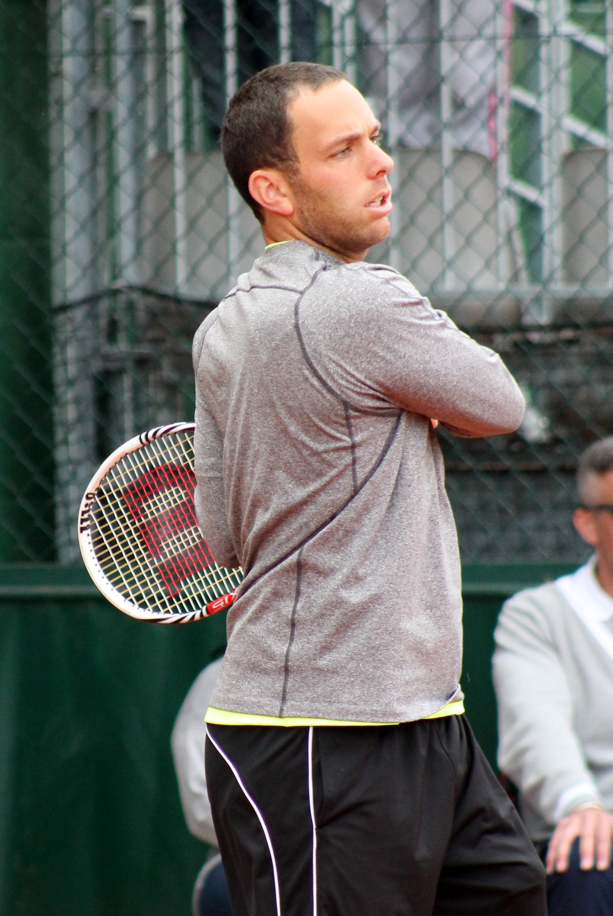 Lipsky RG13 (5)